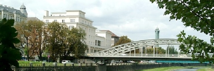 KMO budova a most